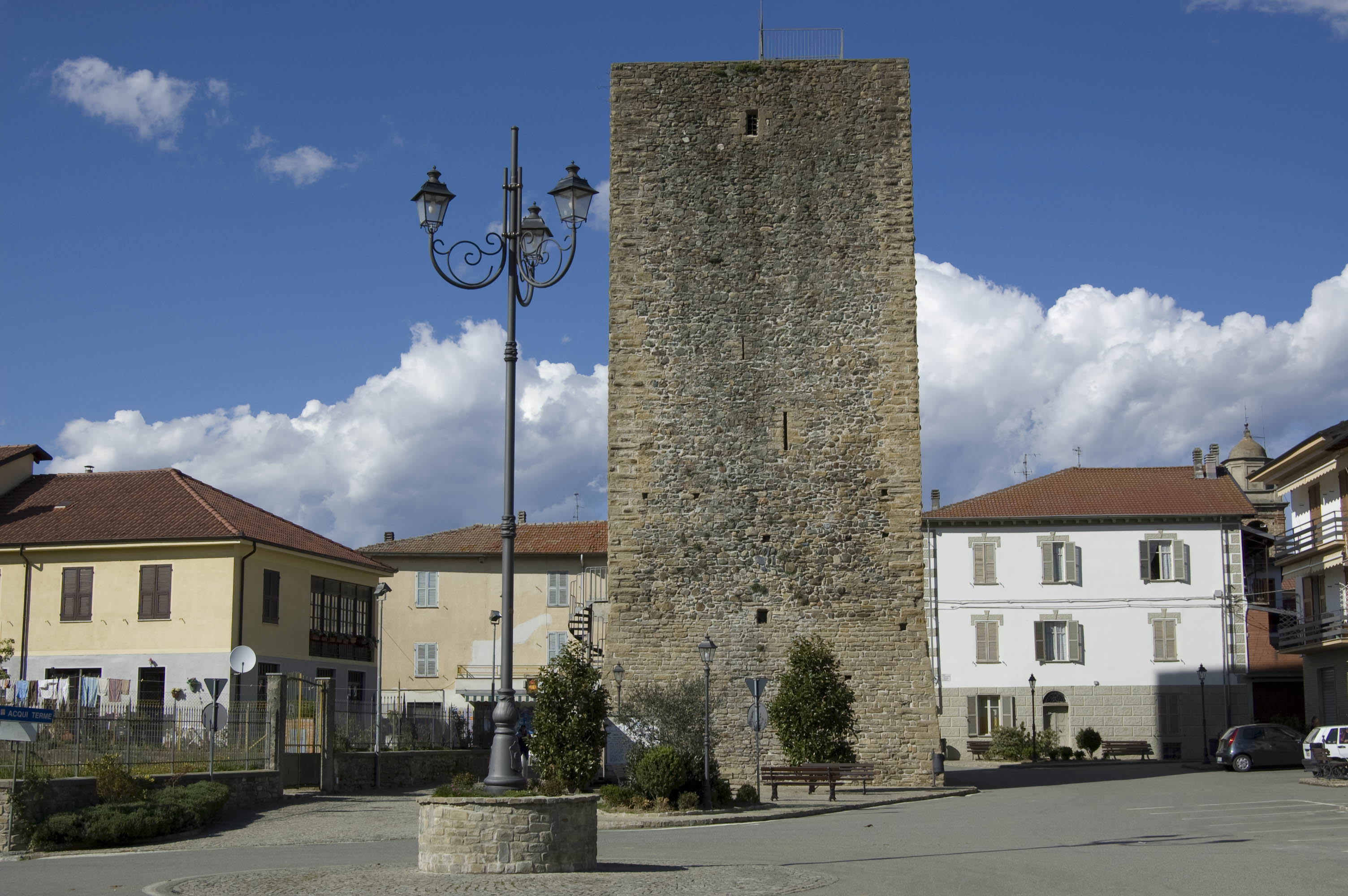 Torre del 1400 nella Piazza Terracini di Cartosio